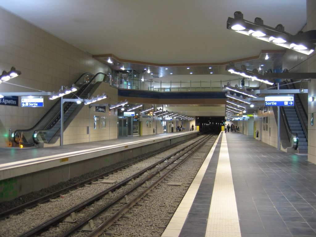 Asnières - Gennevilliers - Les Agnettes, ligne 13 du métro de Paris, le jour de l'inauguration.